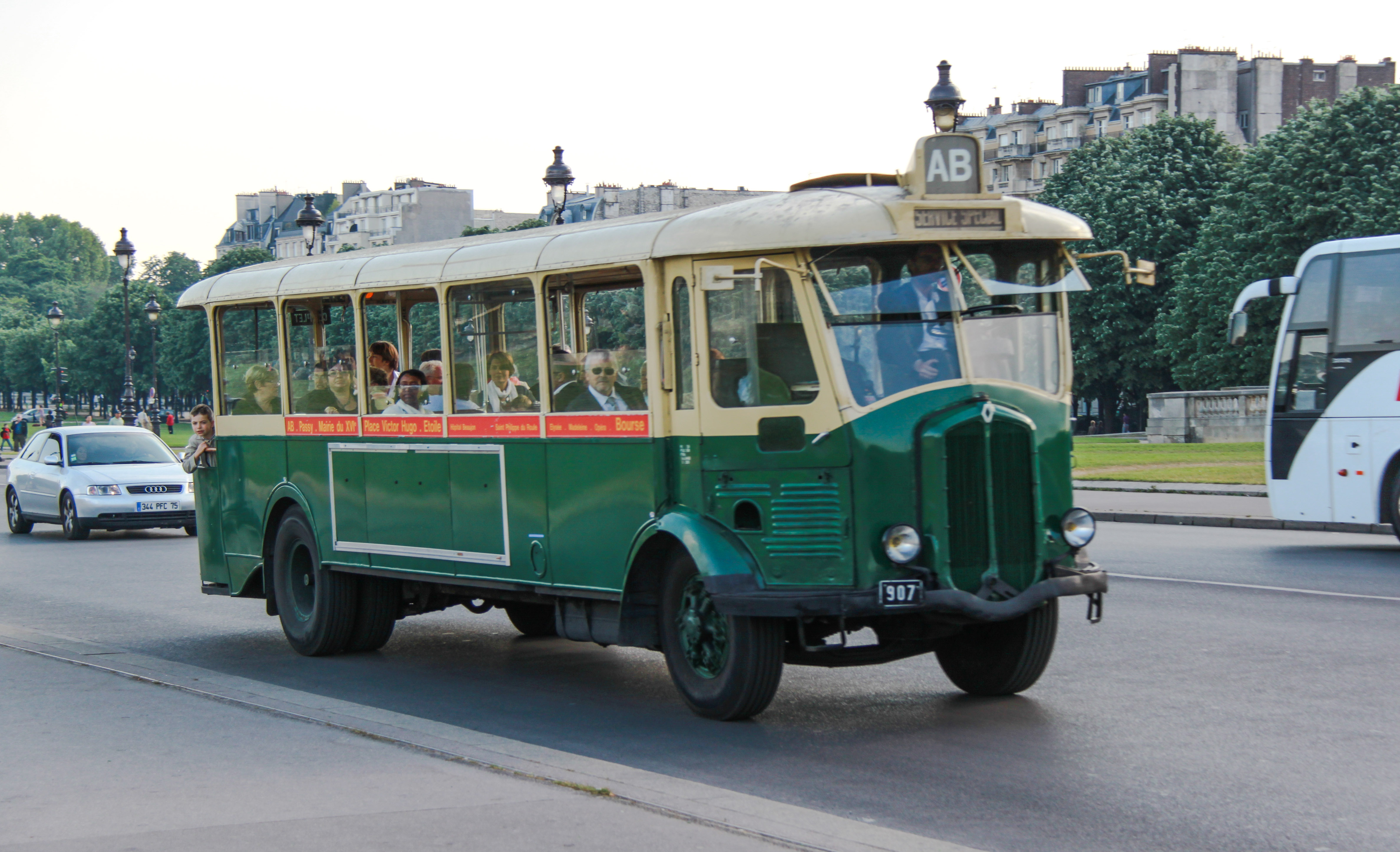 Esplanade des Invalides, Paris.